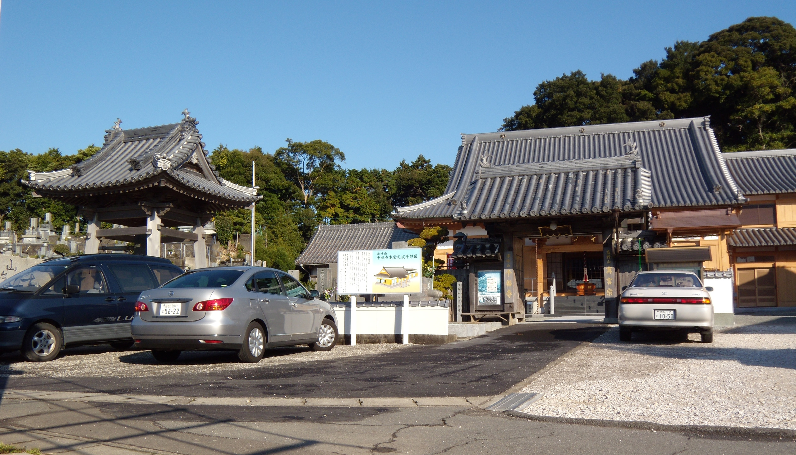 津乃峰山 千福寺